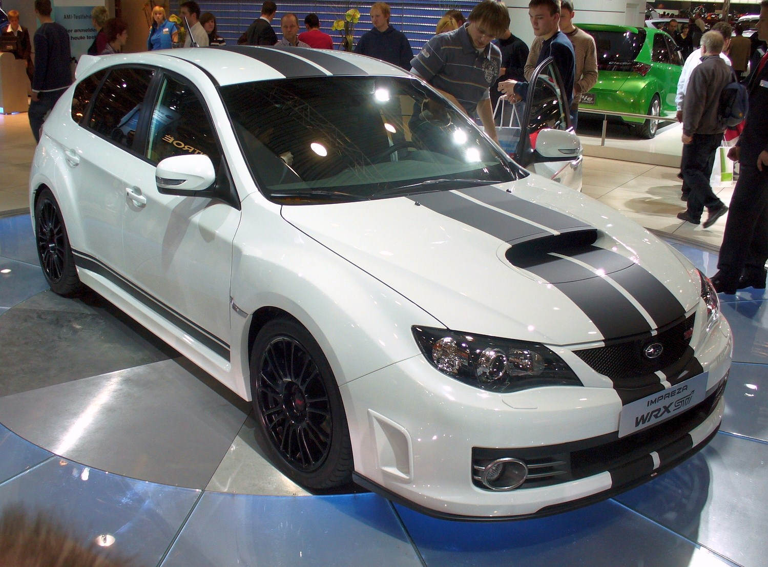 Subaru Impreza WRX STI